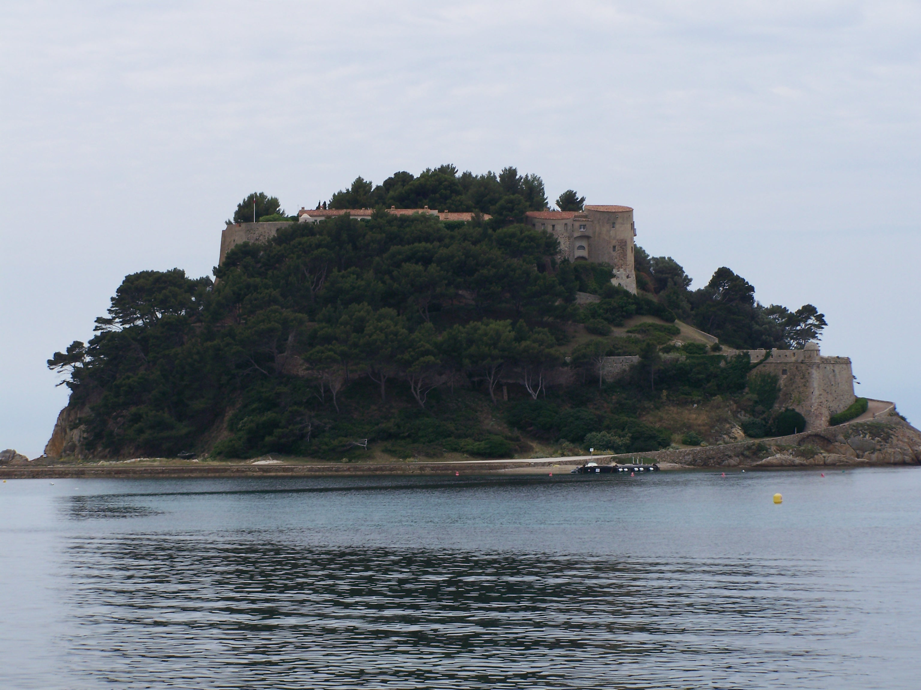 Fort de Brégançon 07.06.2007